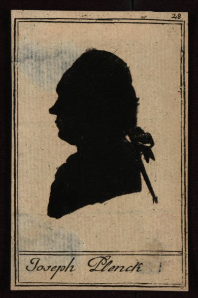 Йозеф Якоб Пленк (1735 — 1807)